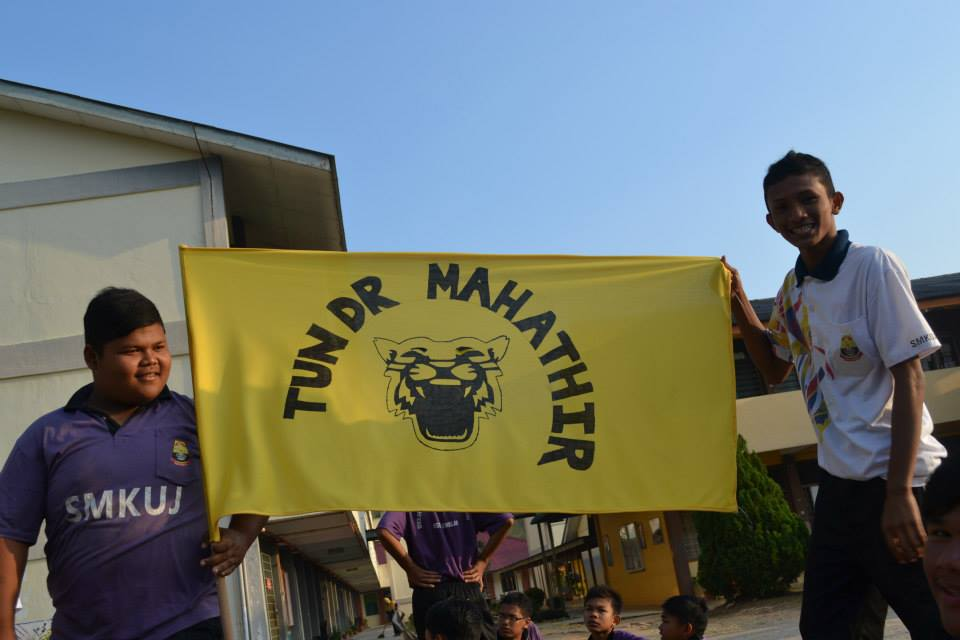 Rumah Kuning SMK Undang Jelebu